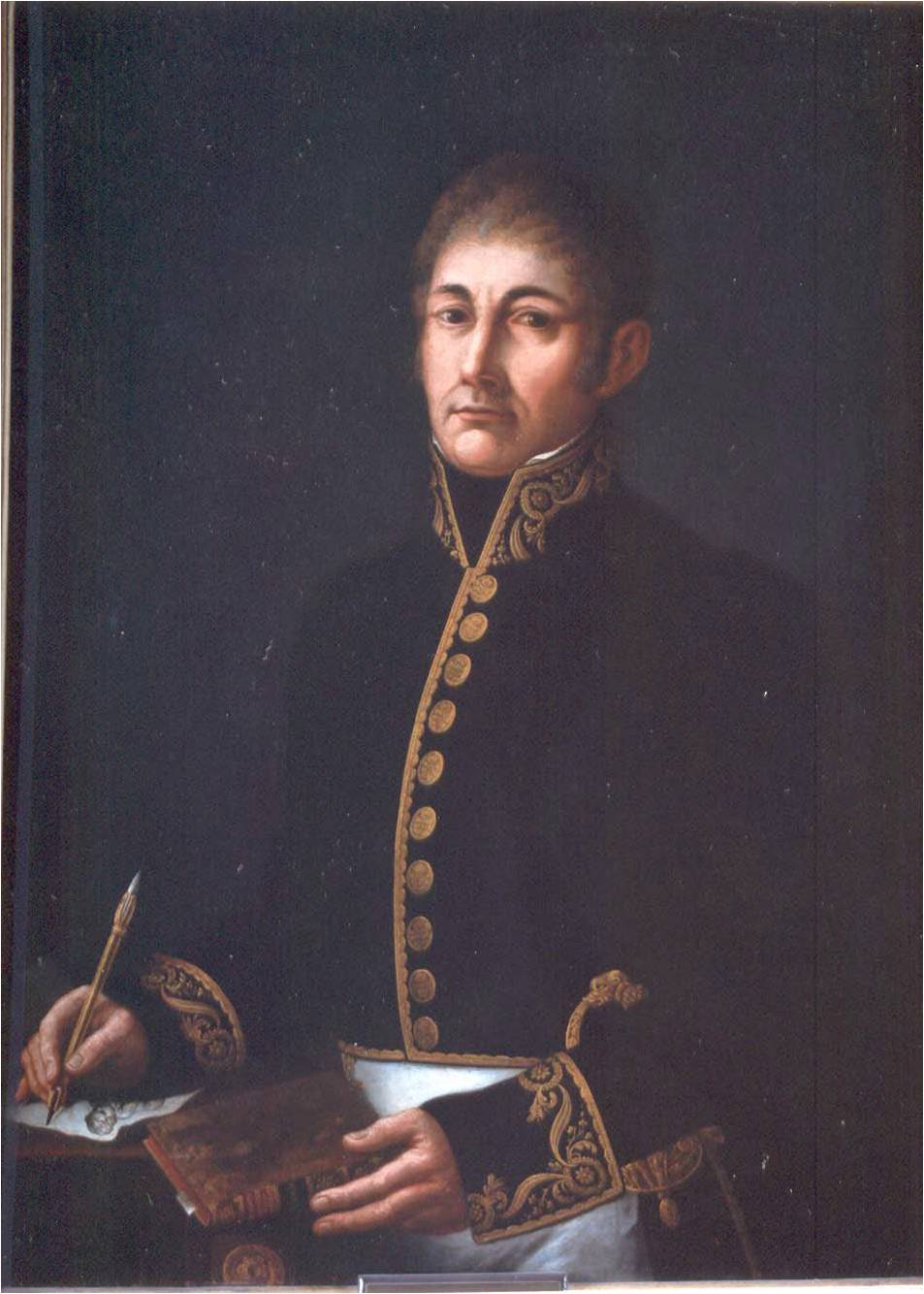 Retrato de Francisco de Longa y Anchía (1783-1831), que fue un guerrillero destacado en la Guerra de la Independencia Española y alcanzó el rango de teniente general del ejército español, siendo además capitán general de Valencia y amasando una gran fortuna.